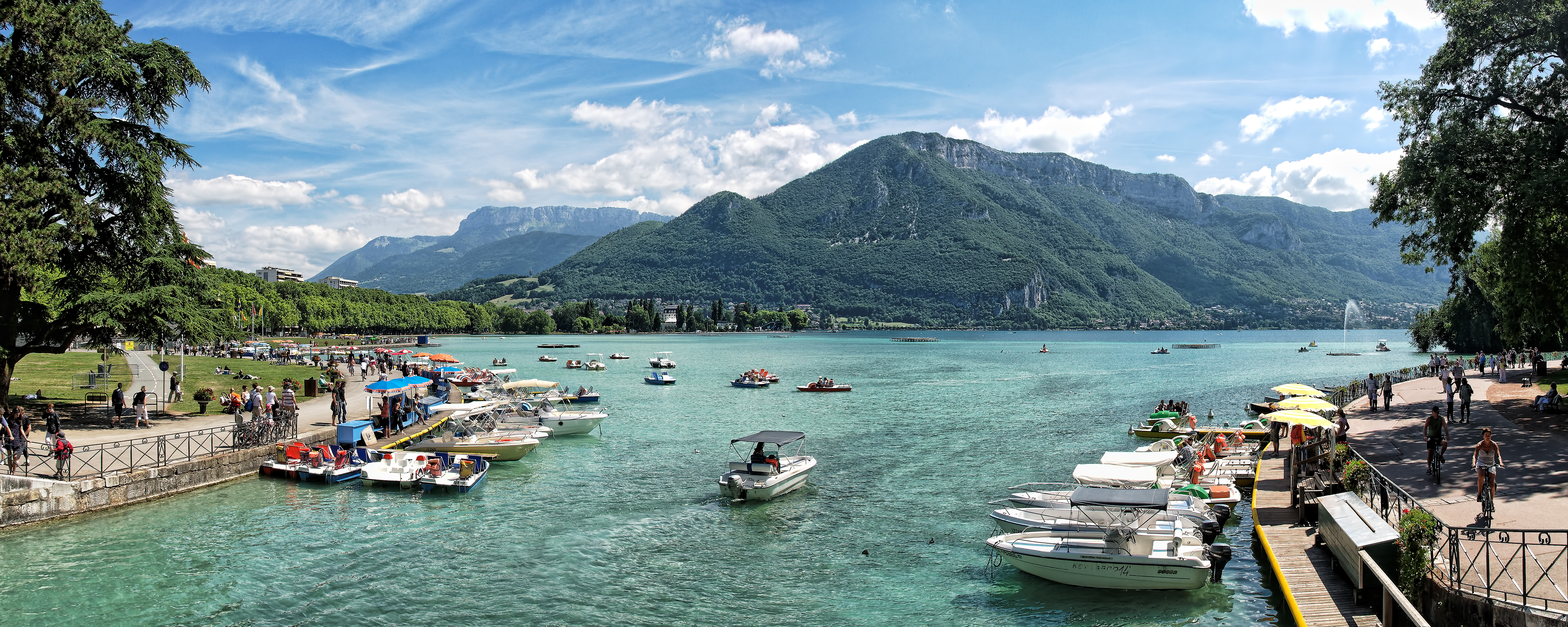 Lac d'Annecy